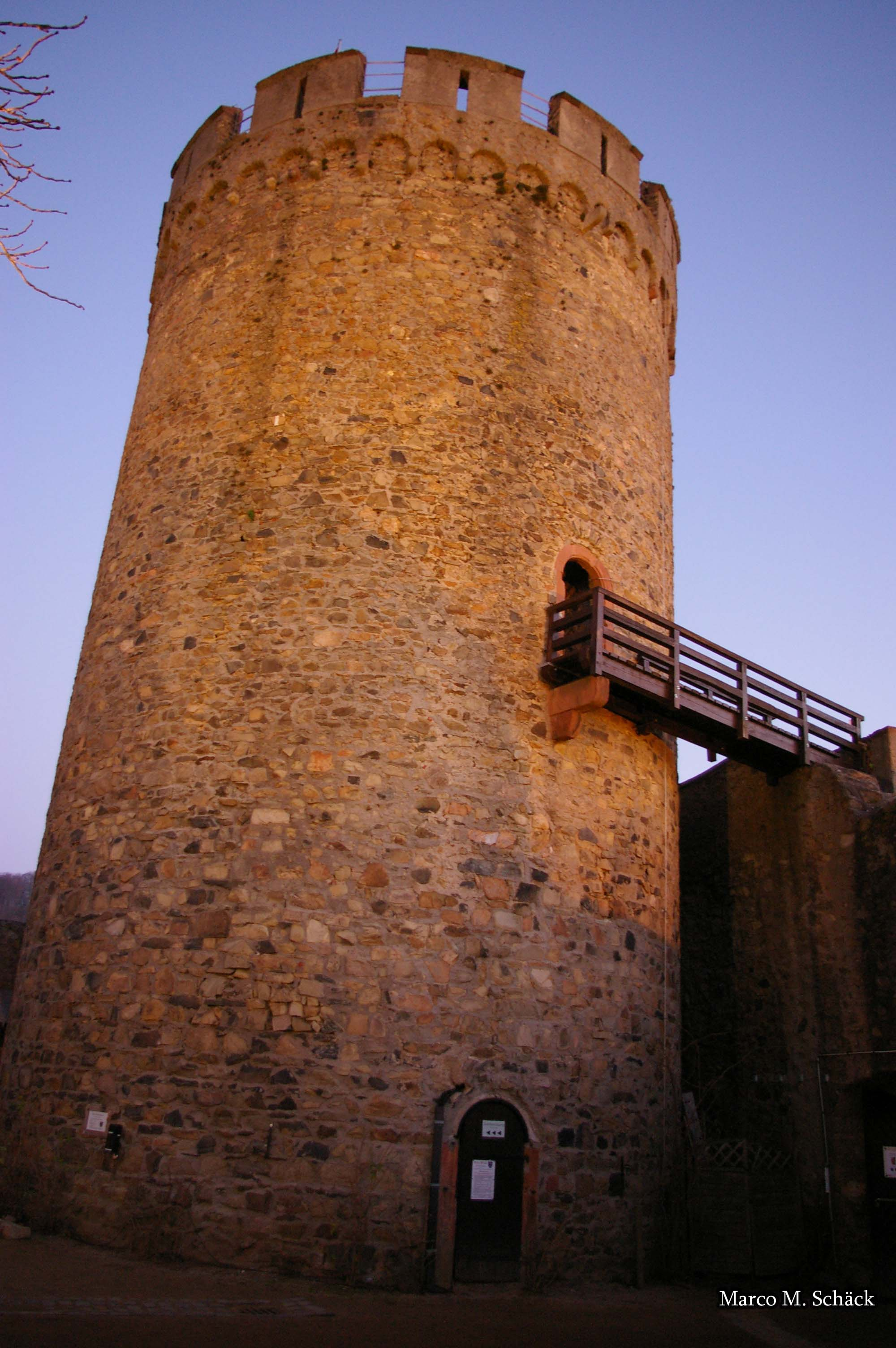 Schloss Alsbach